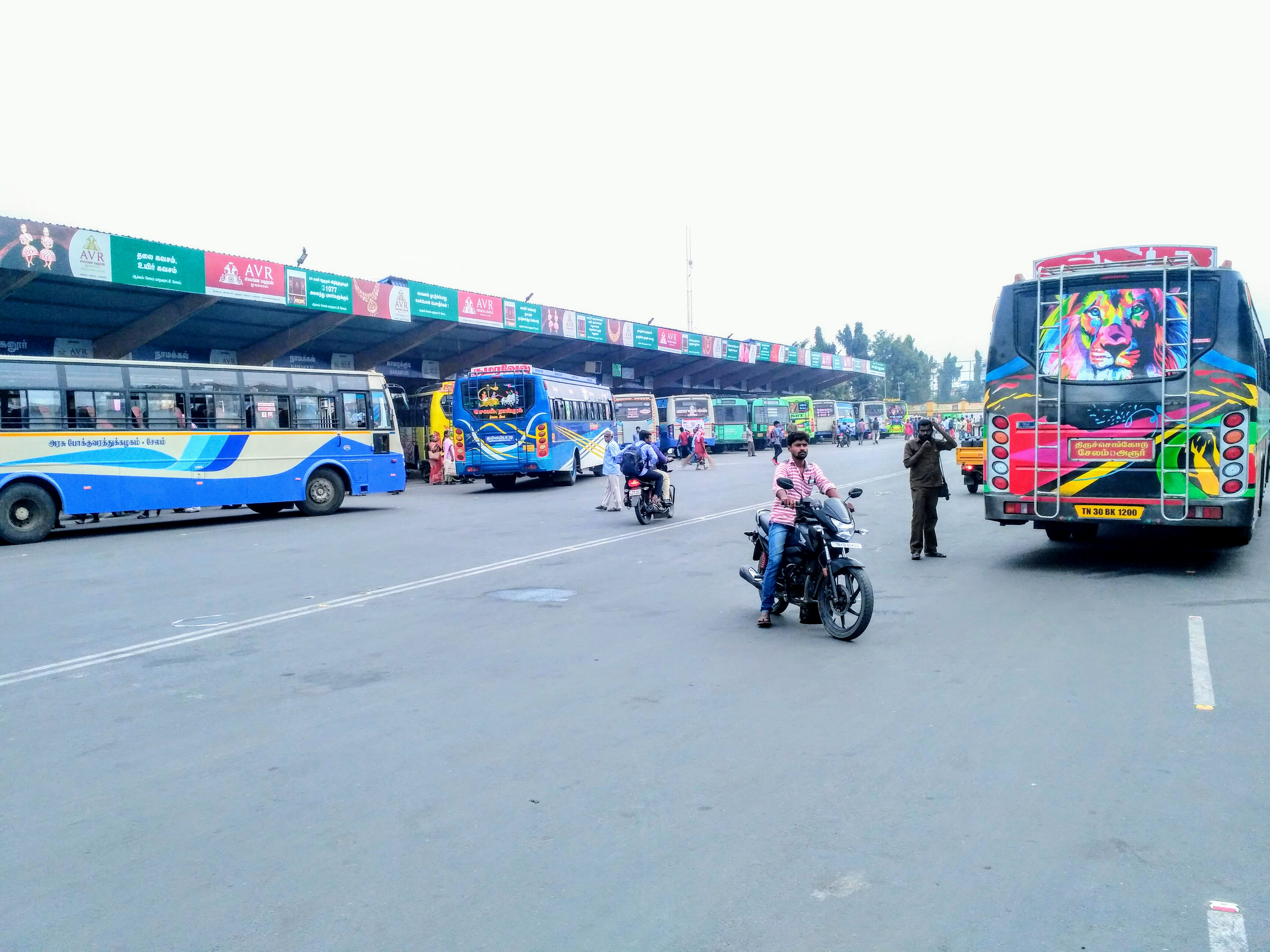 சேலம் பேருந்து நிலையத்தின் உட்புறம்..